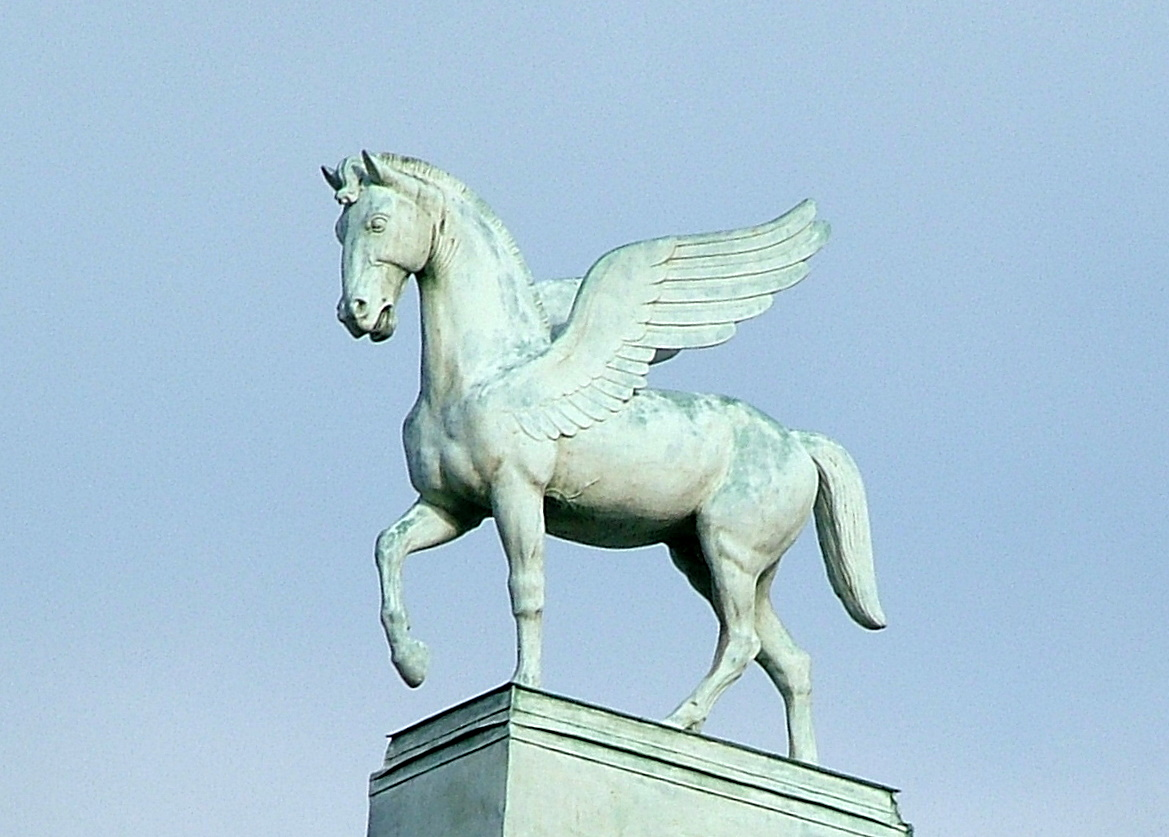 Pegasus, Theater in Poznan (Teatr Wielki w Poznaniu)